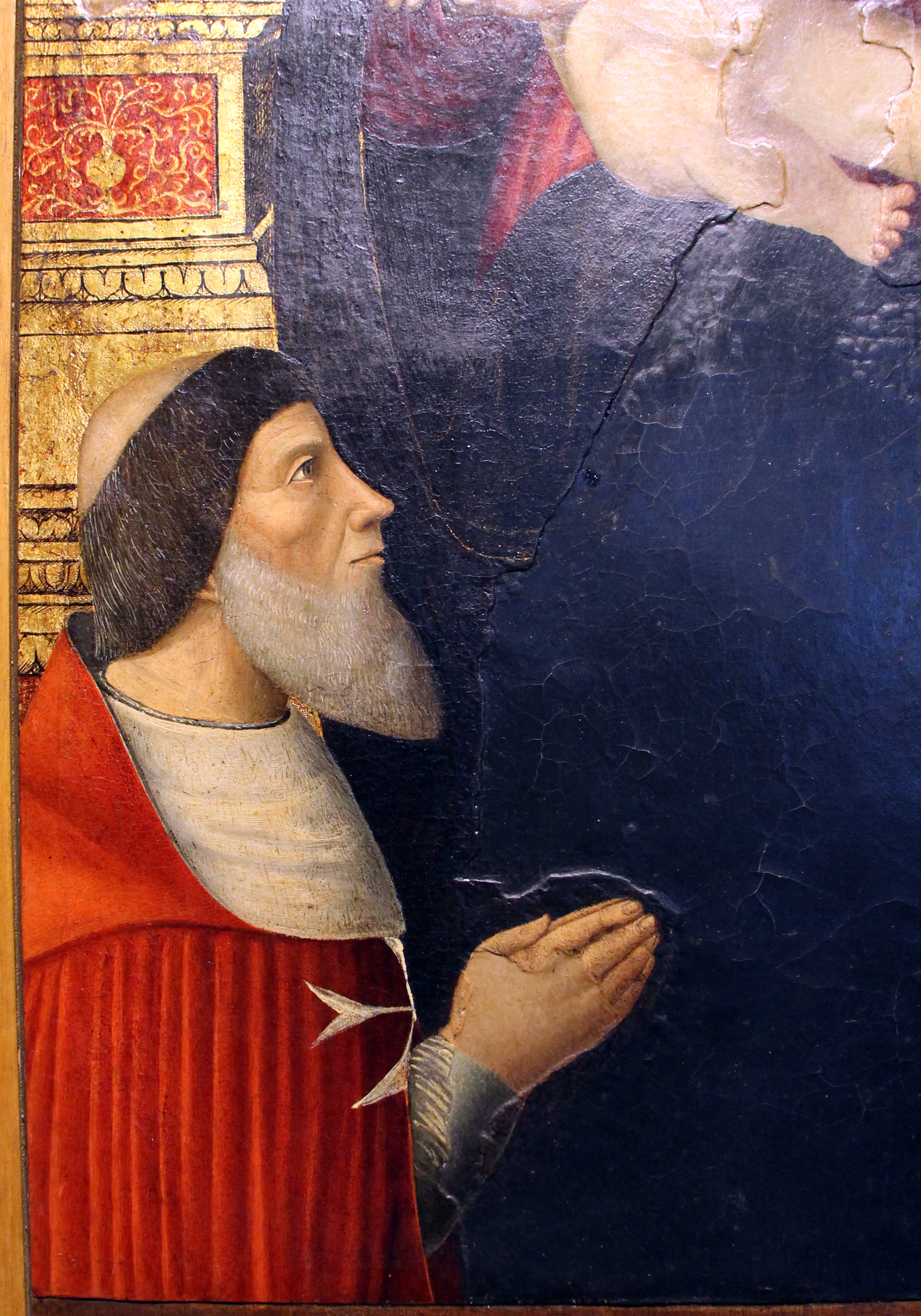 detail